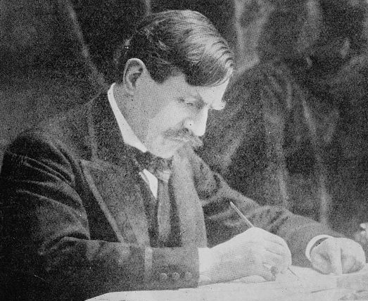 French writer Paul Bourget (1852-1935)